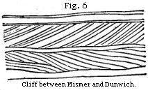 Figure 6